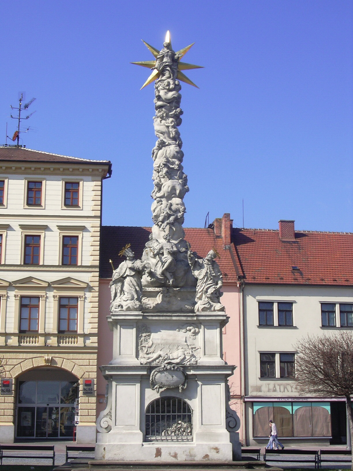 Mariánský sloup (Vyškov- czech republic)